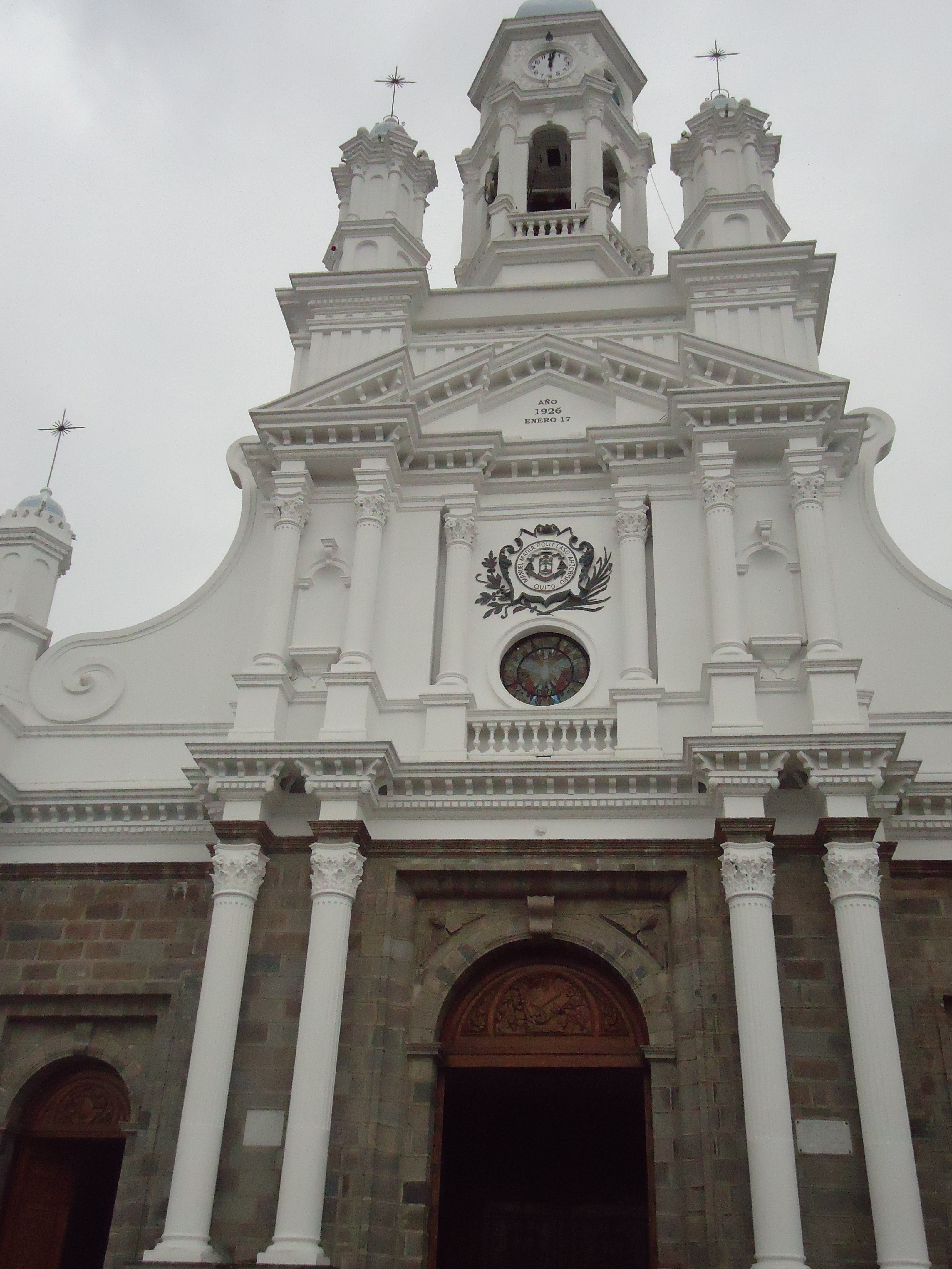 Iglesia Matriz de Sangolquí